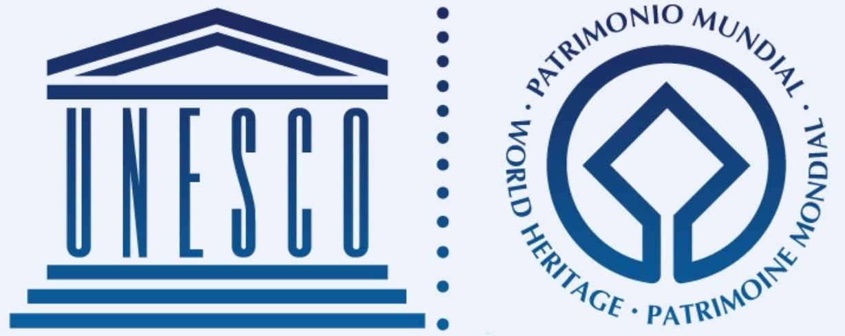 Patrimonio Mondiale dellUmanità